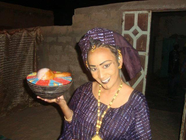 Femme appartenant à l'ethnie Toucouleur dans le Fouta Tooro